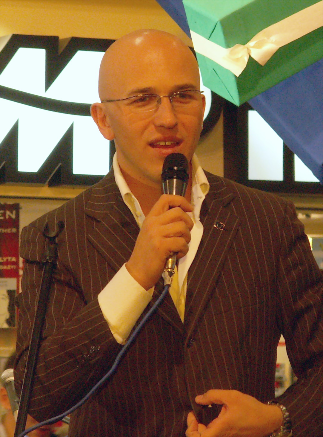 Vito Casetti